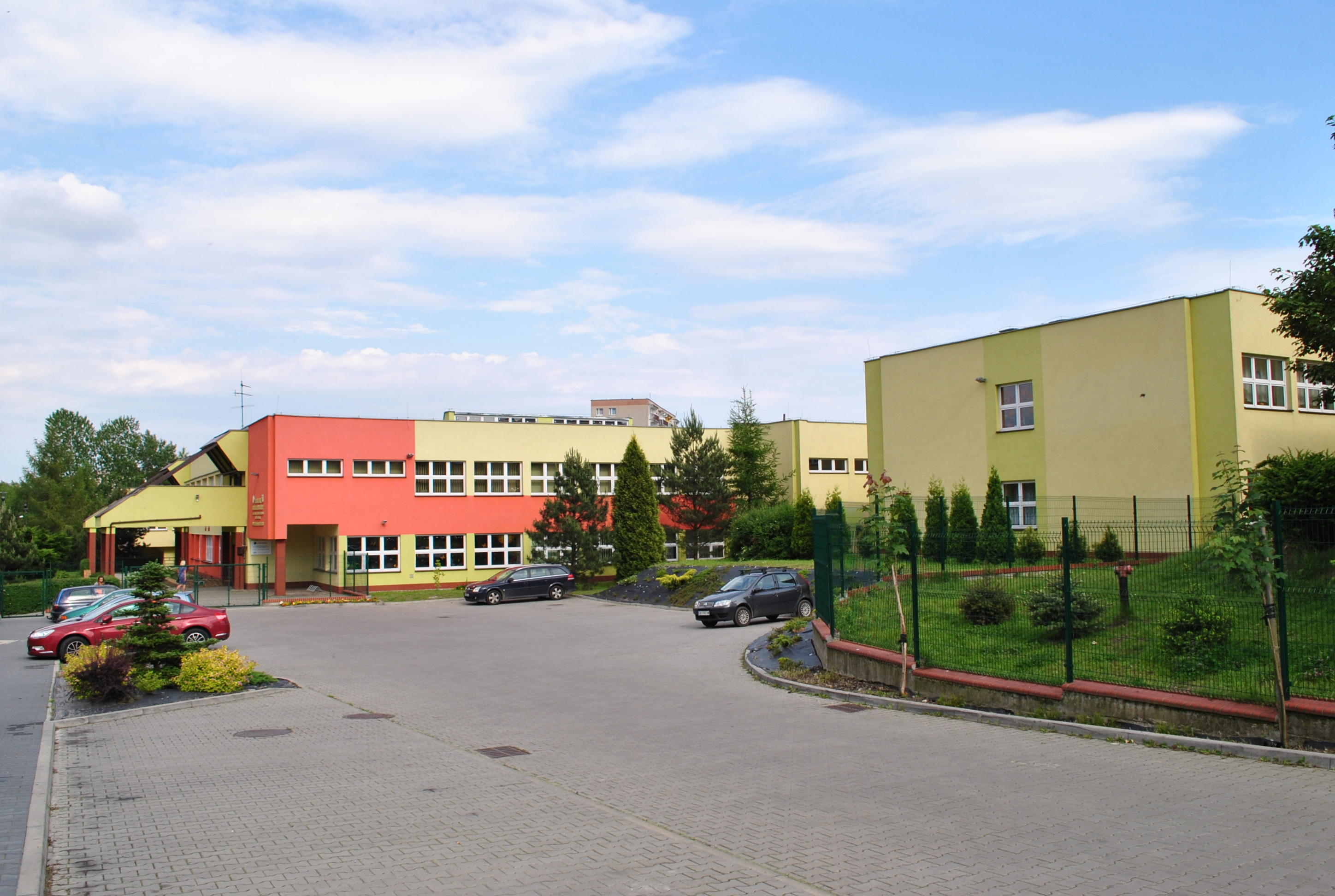 Katowice - Osiedle Witosa. Zespół Szkół Ogólnokształcących nr 7 przy ul. Witosa 23